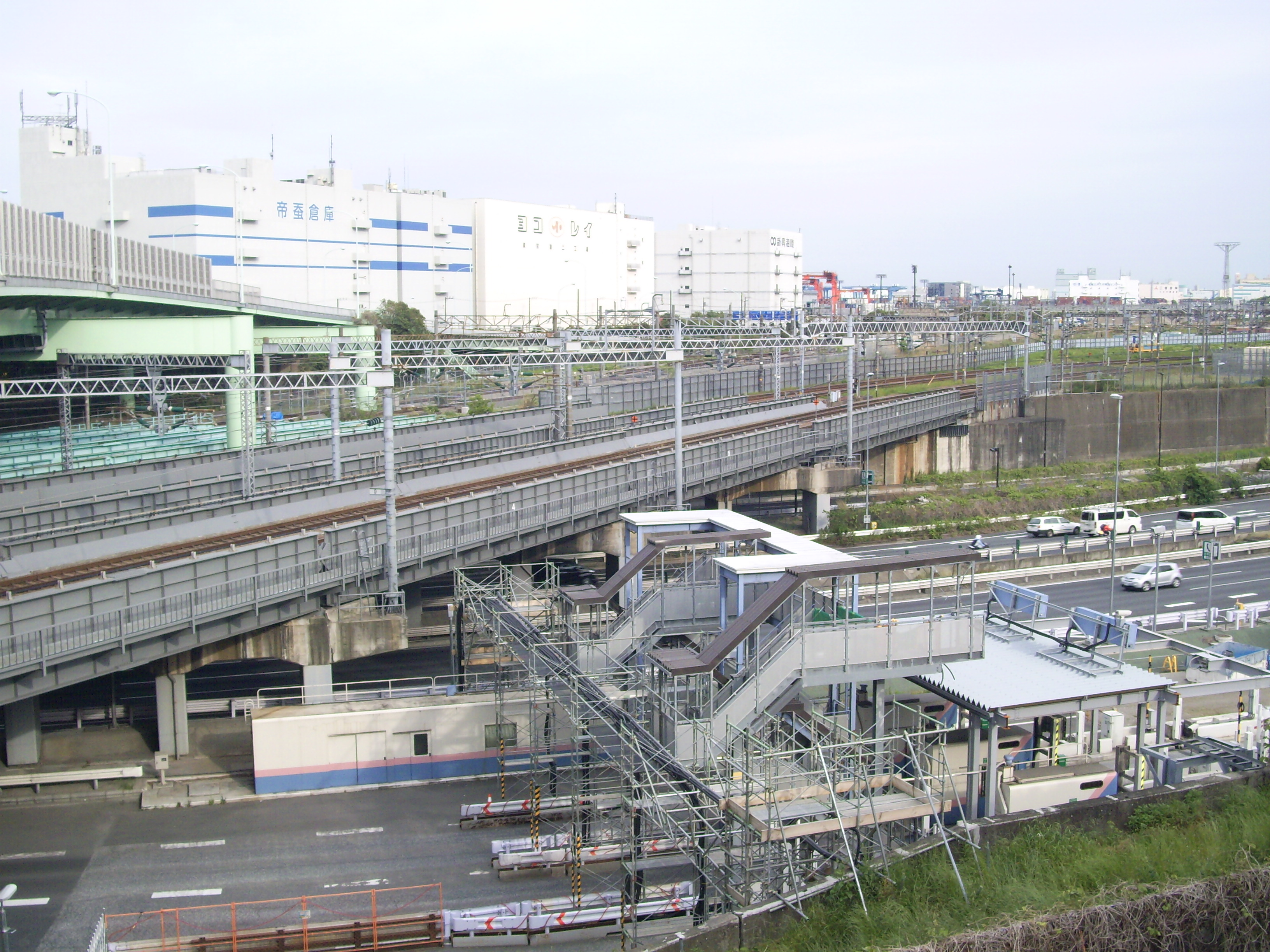 東海道新幹線大井車両基地引き込み線：湾岸道路を越える跨道橋 ㊟カメラを起動すると日付機能が出荷時のものに初期化されるため、ファイル履歴の撮影日時とメタデータの原画像データの生成日時が異なります